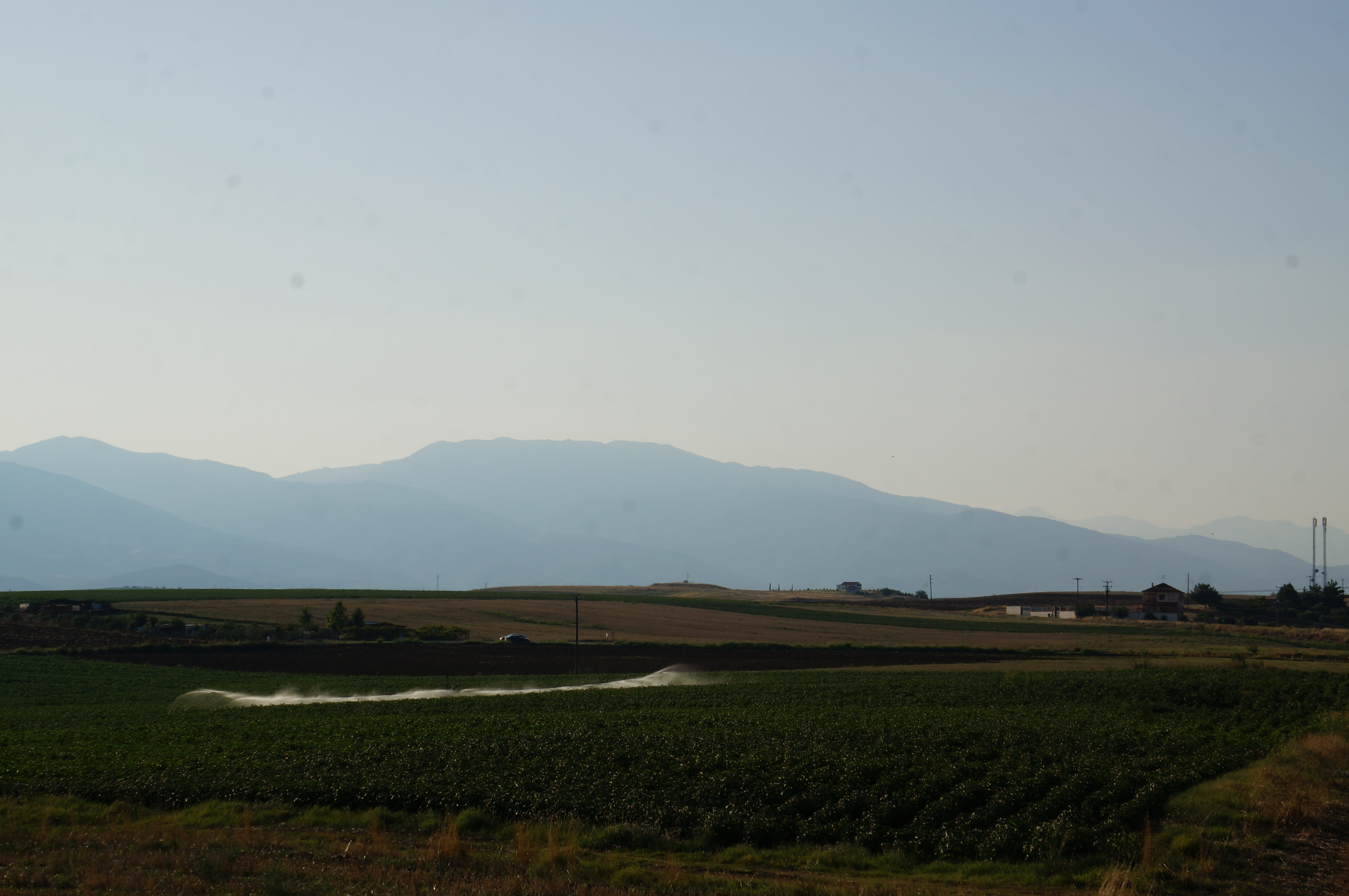 Sur le territoire d'Europos.